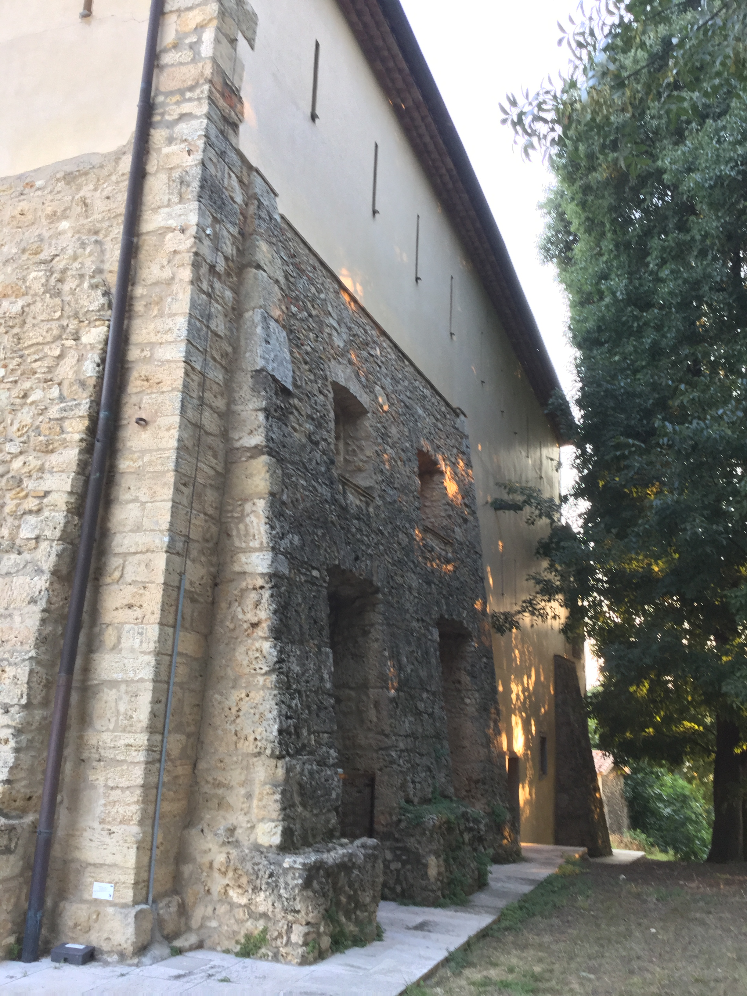 Can Puig de la Bellacasa, casa pairal de Banyoles (any 1300), convertida en el Fort Beurmann el 1812. Des del 2000 és la seu del Consell Comarcal del Pla de l'Estany.